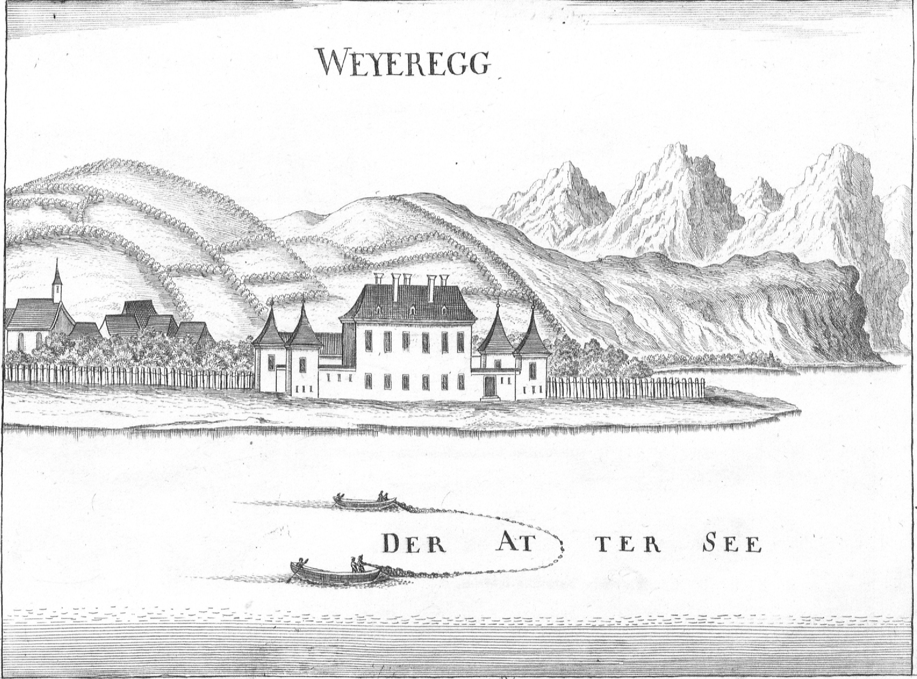 Schloss Weyregg nach Vischer, 1792 abgebrochen